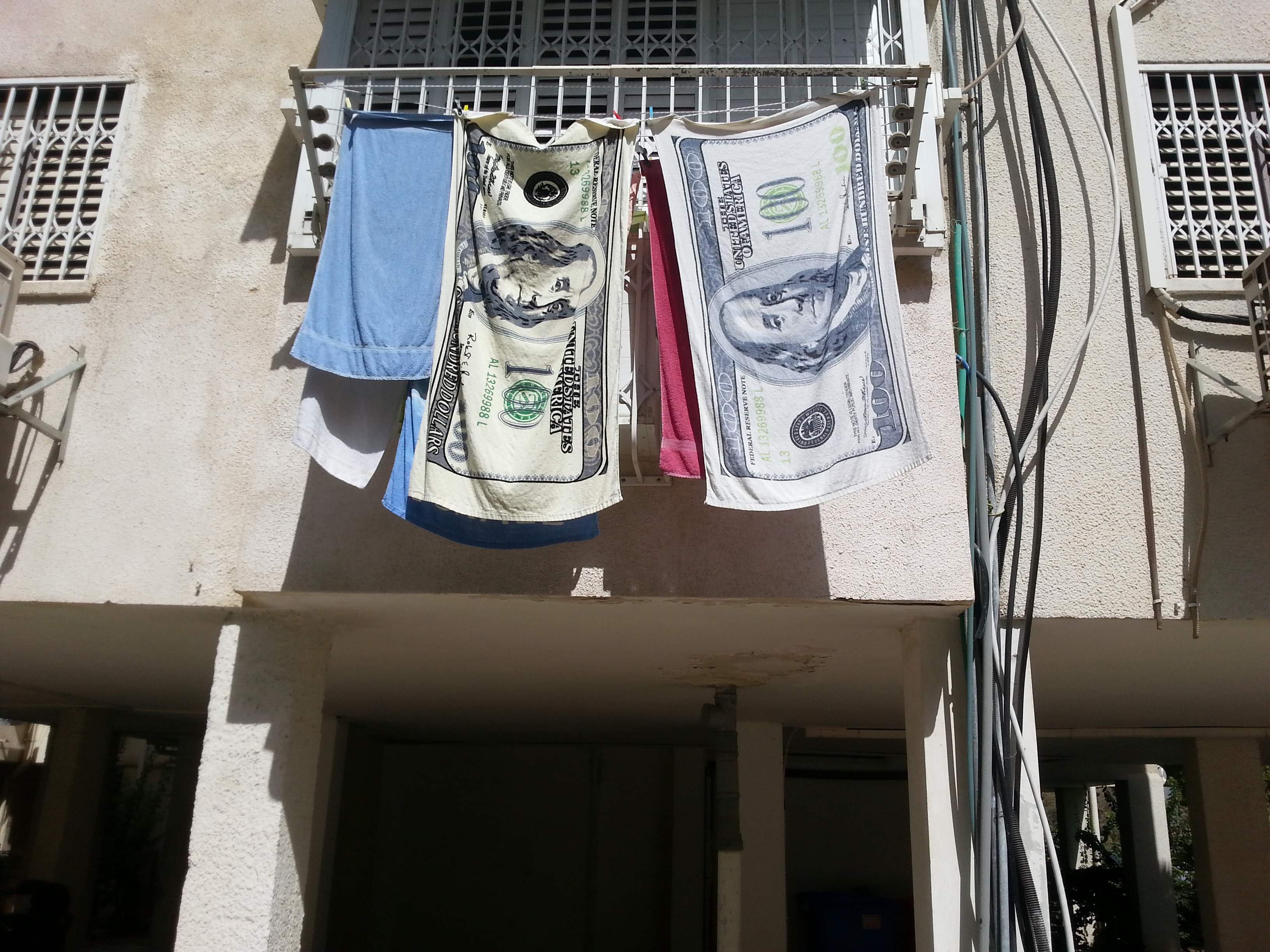 Washable dollar